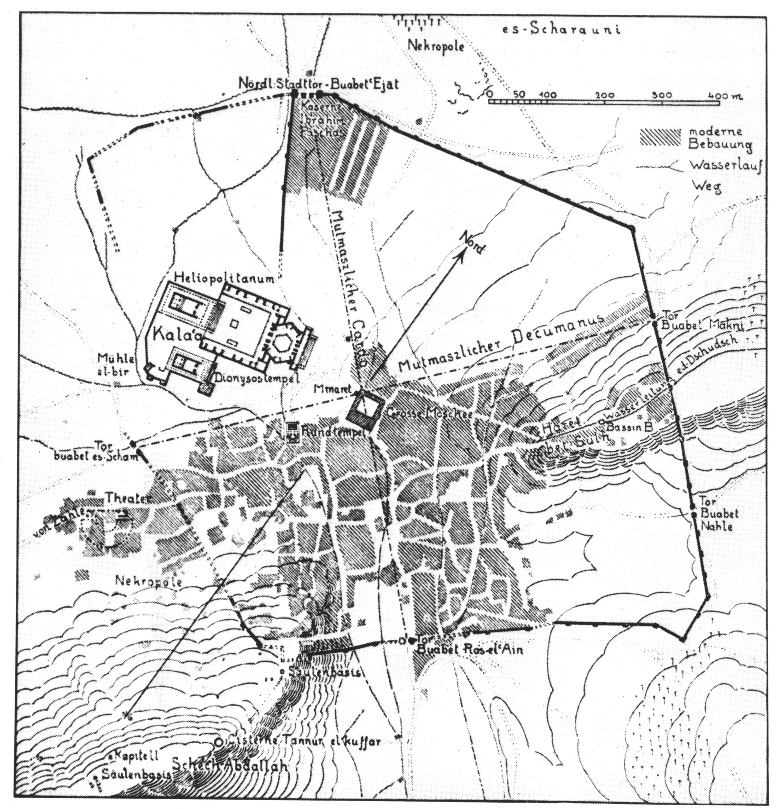 Baalbek helyszínrajza